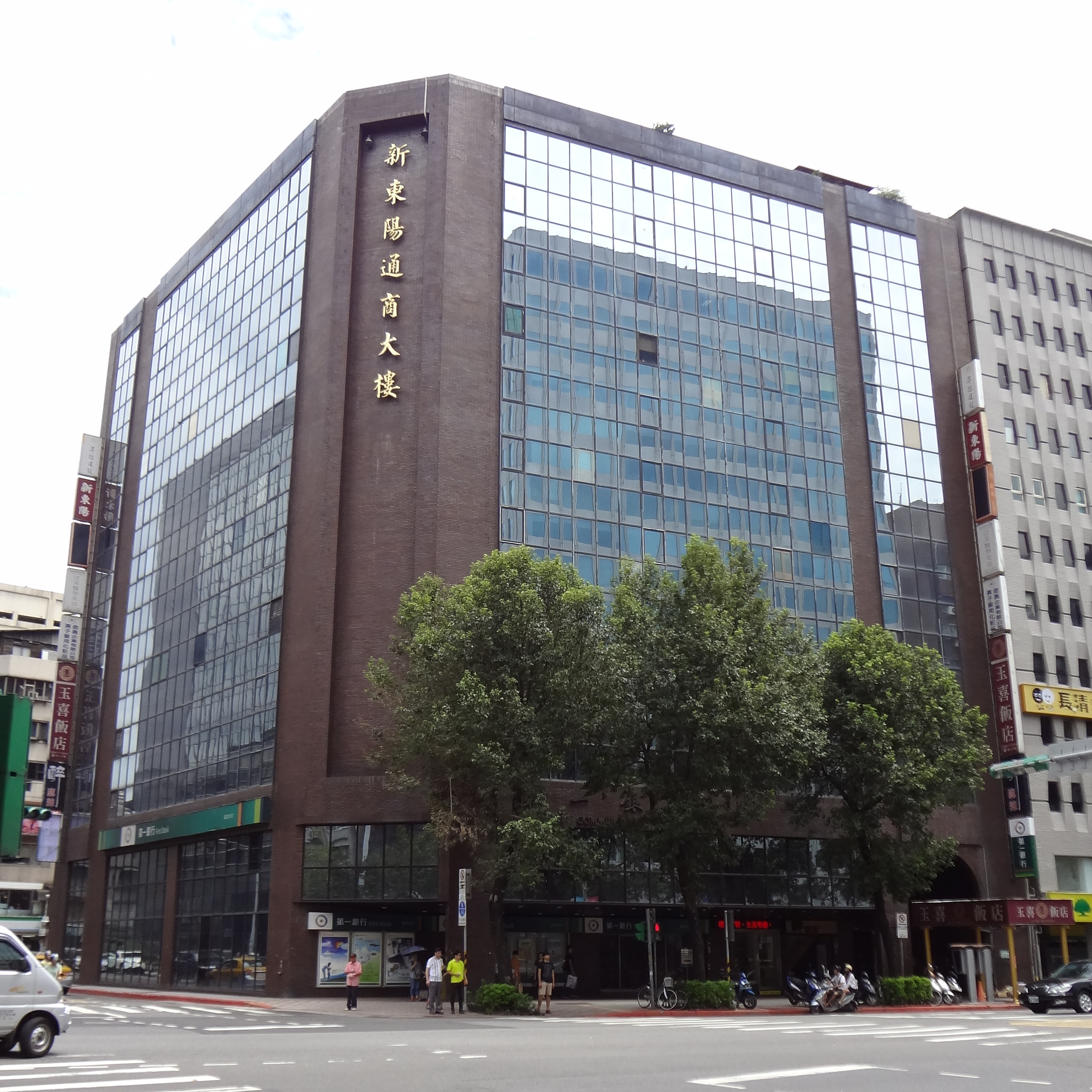 新東陽通商大樓，位於臺北市大安區忠孝東路四段289號。新東陽總部位於8樓，昇陽建設總部位於12樓。